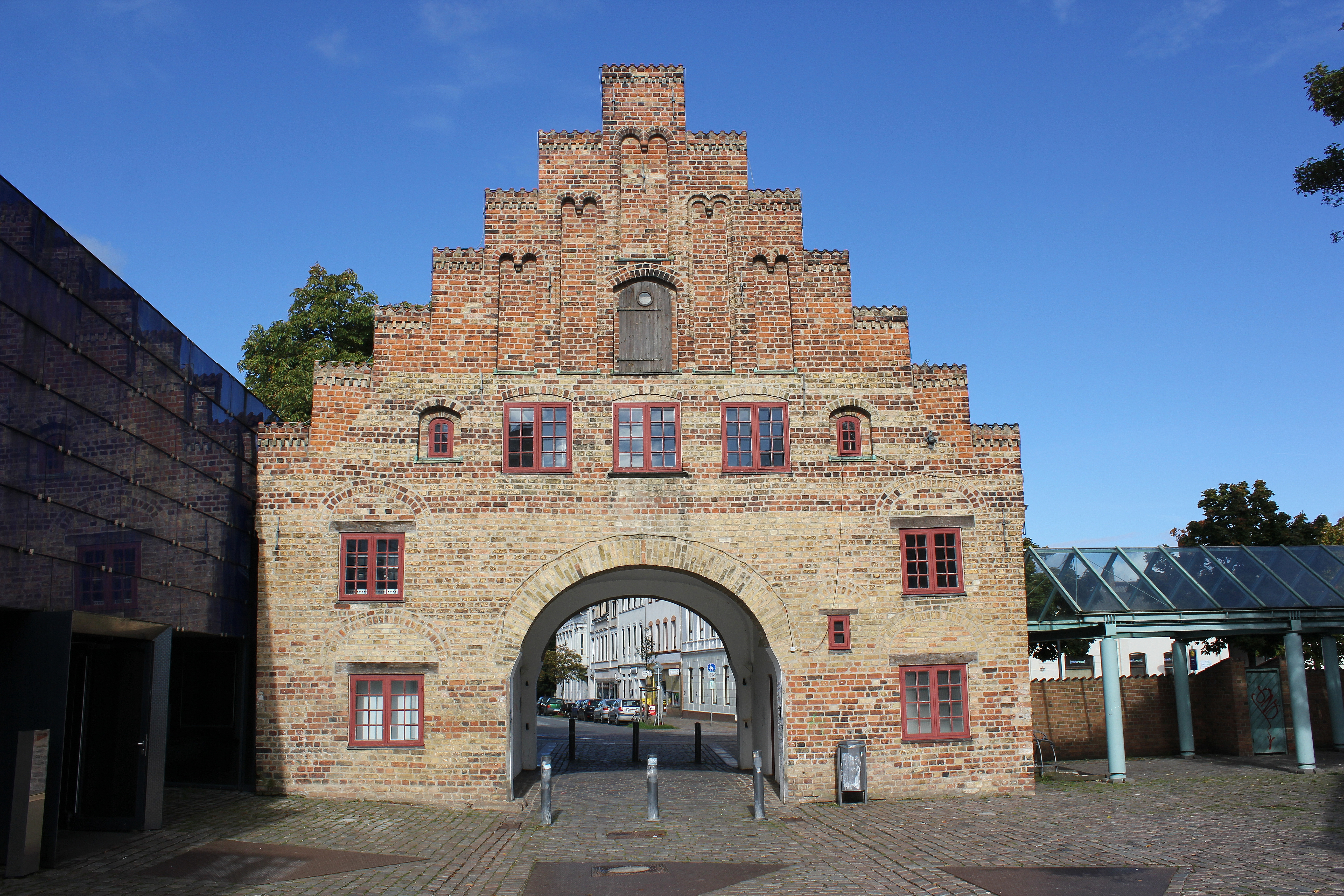 Nordertor, Flensburg 2013, Bild 08